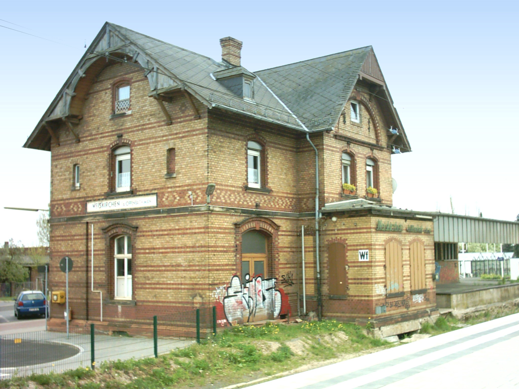 Bahnhof Weiskirchen an der Rodgaubahn Quelle: selbst fotografiert Fotograf/Zeichner: presse03 Datum: 1. Mai 2006